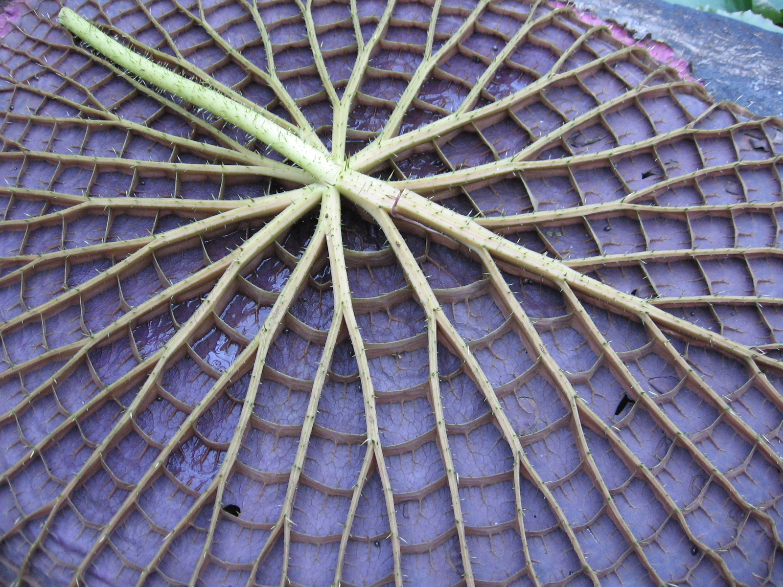 Victoria amazonica, back side